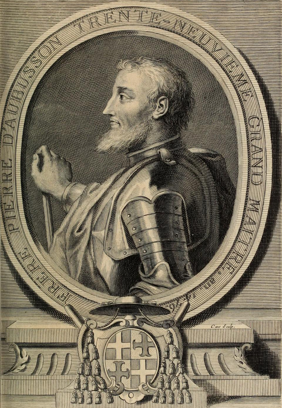 grand maître de l'ordre de Saint-Jean de Jérusalem